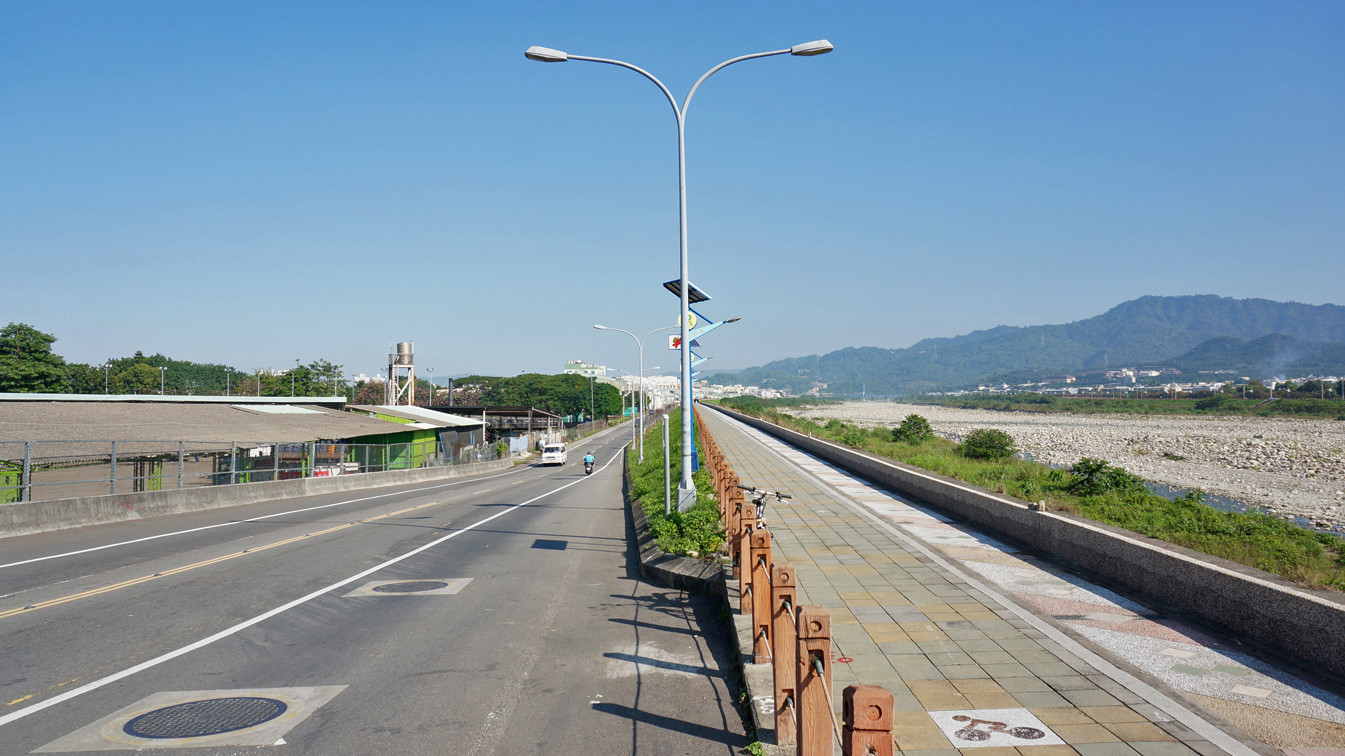 中文（台灣）: 太平區太堤西路與頭汴坑溪自行車道